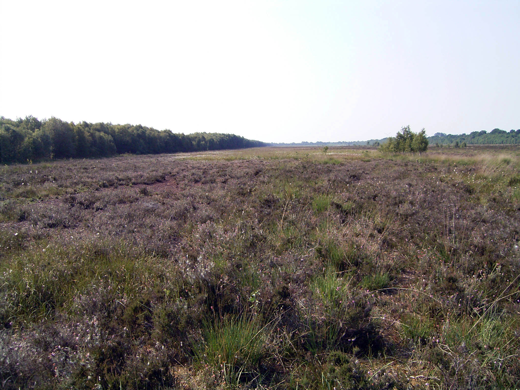 Moorheide nach Torfabbau bei Papenburg, in feuchten Senken mit Schmalblättrigem Wollgras (Eriophorum angustifolium) und Weißem Schnabelried (Rhynchospora alba), in trockensten Bereichen auch mit Besenheide (Calluna vulgaris)